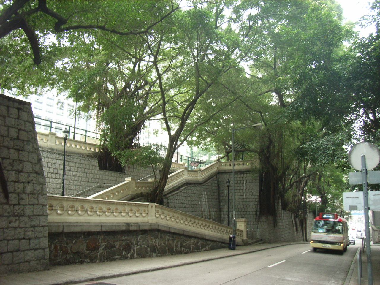 香港佐治五世紀念公園 King George V Memorial Park, Sai Ying Pun, Hong Kong